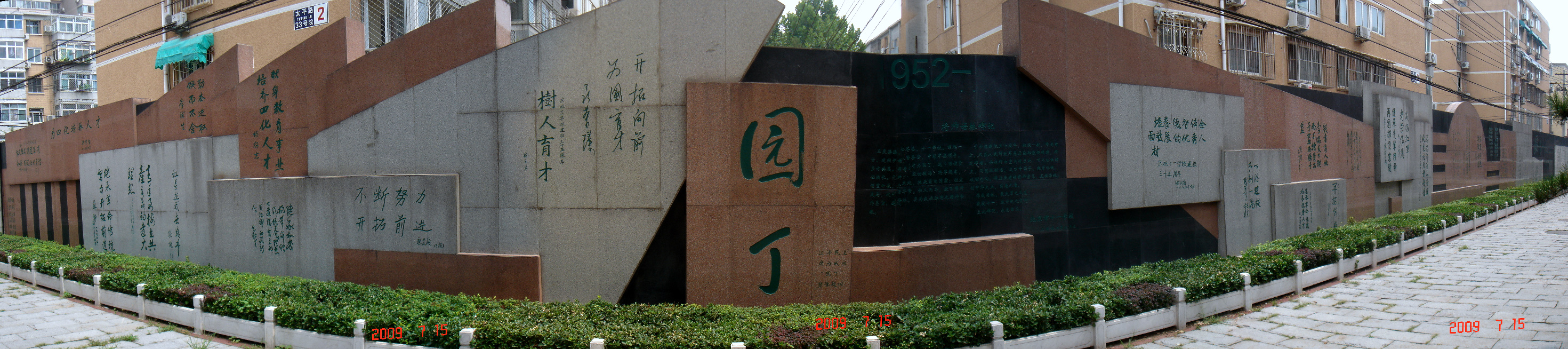 北京市十一学校将帅语林碑